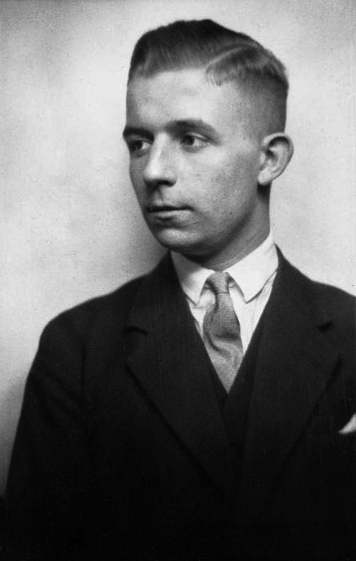 Horst Wessel Abgebildete Personen: Wessel, Horst: SA-Sturmführer, 1930 erschossen, Deutschland (GND 118631721)